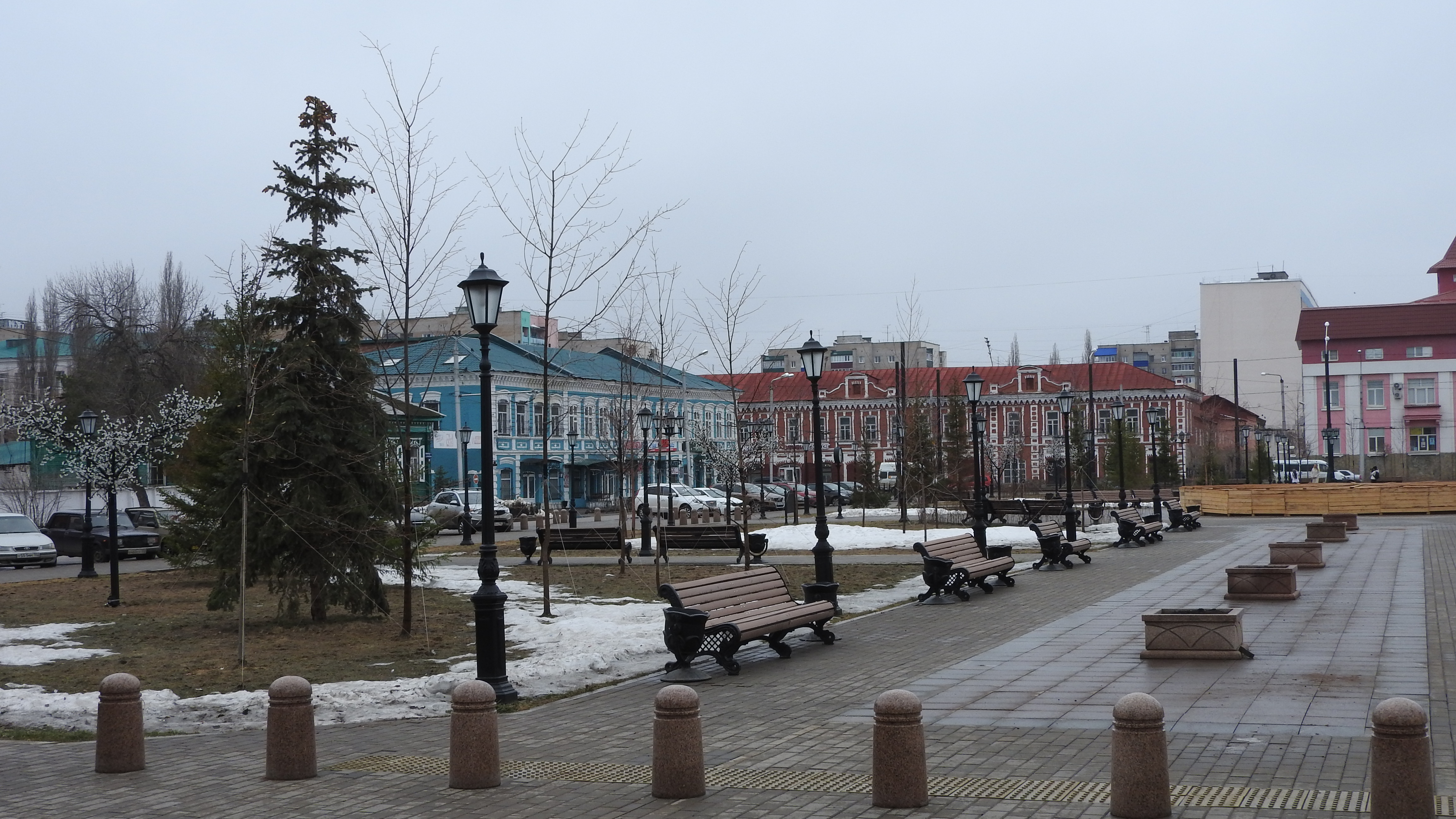 Башҡортса: Стәрлетамаҡта сквер